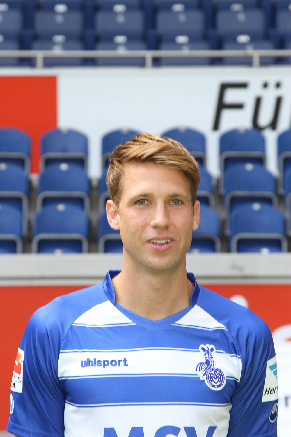 Steffen Bohl 2015